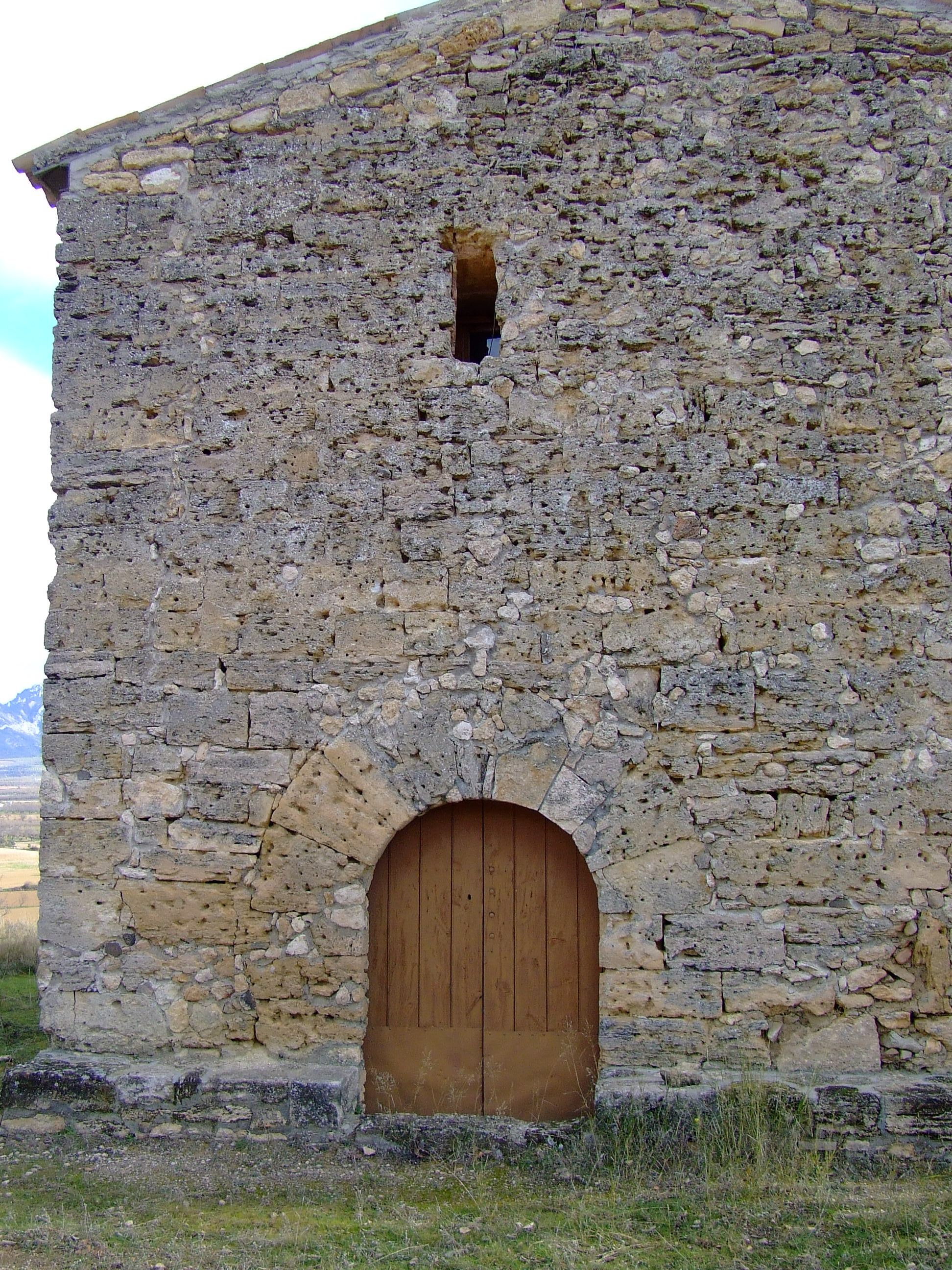 La façana oest del santuari de la Mare de Déu de les Esplugues (Conques, Isona i Conca Dellà, Pallars Jussà)